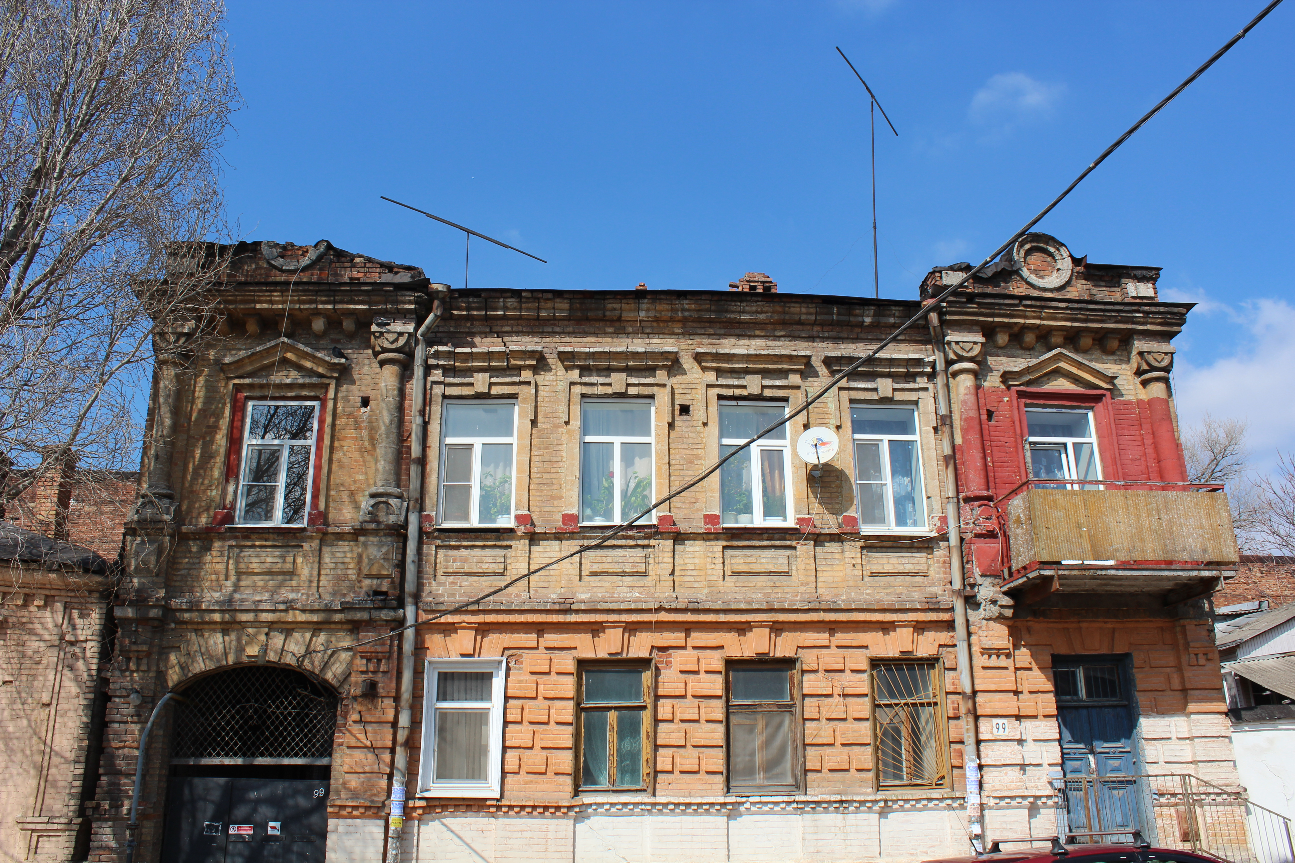 Здание города Ростова-на-Дону